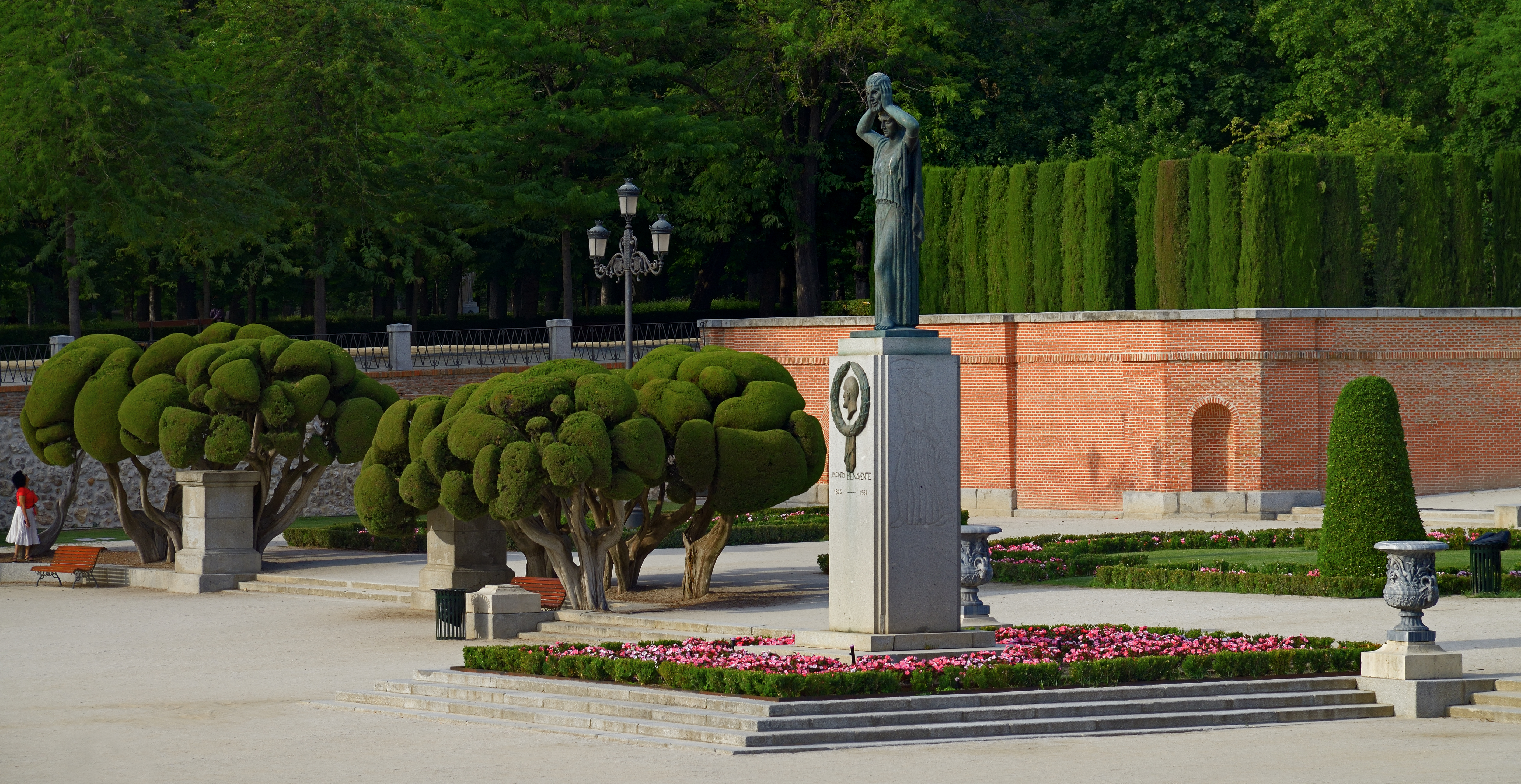 Monument to Jacinto Benavente in the Buen Retiro Park, Madrid, Spain